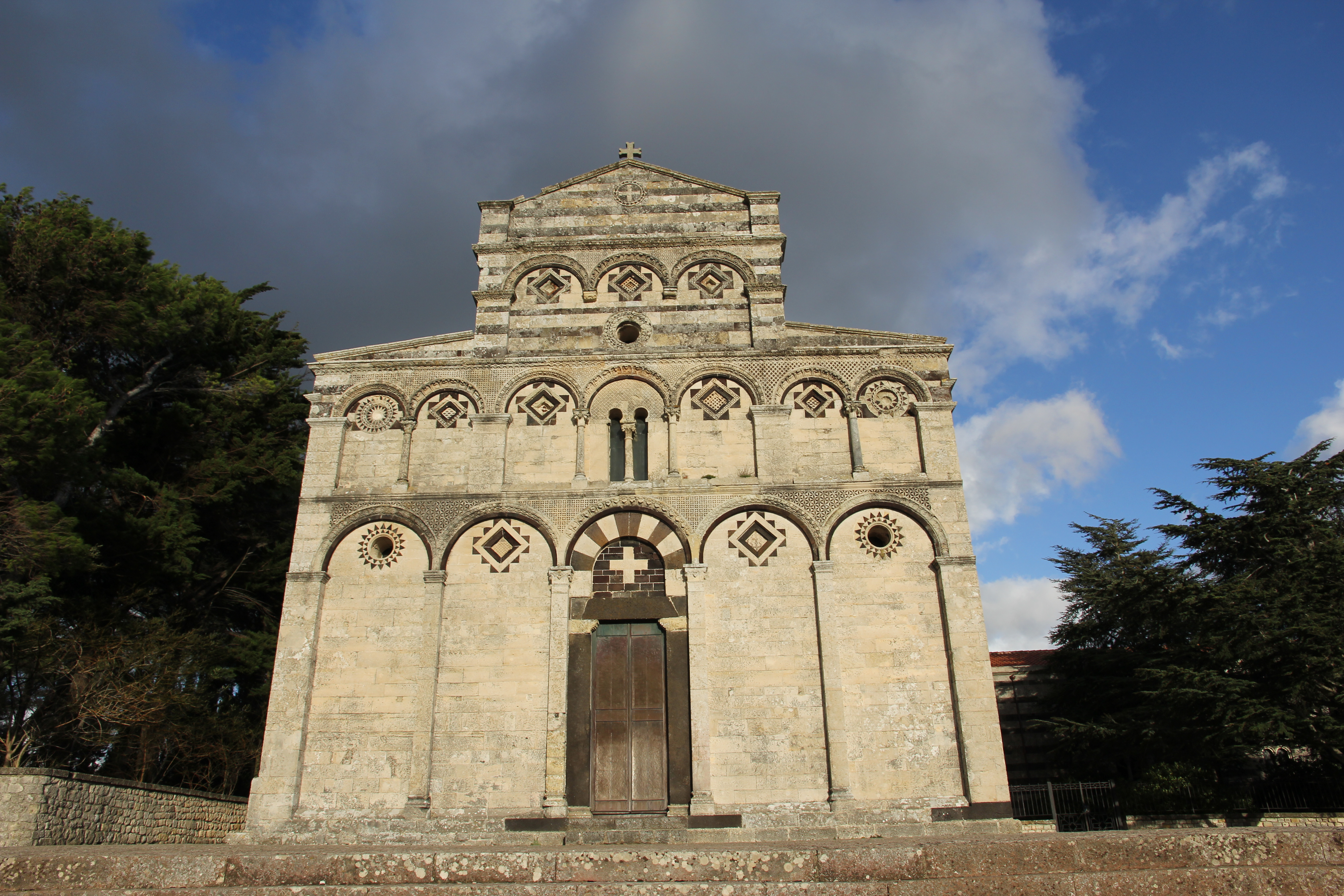 Borutta - Chiesa di San Pietro di Sorres